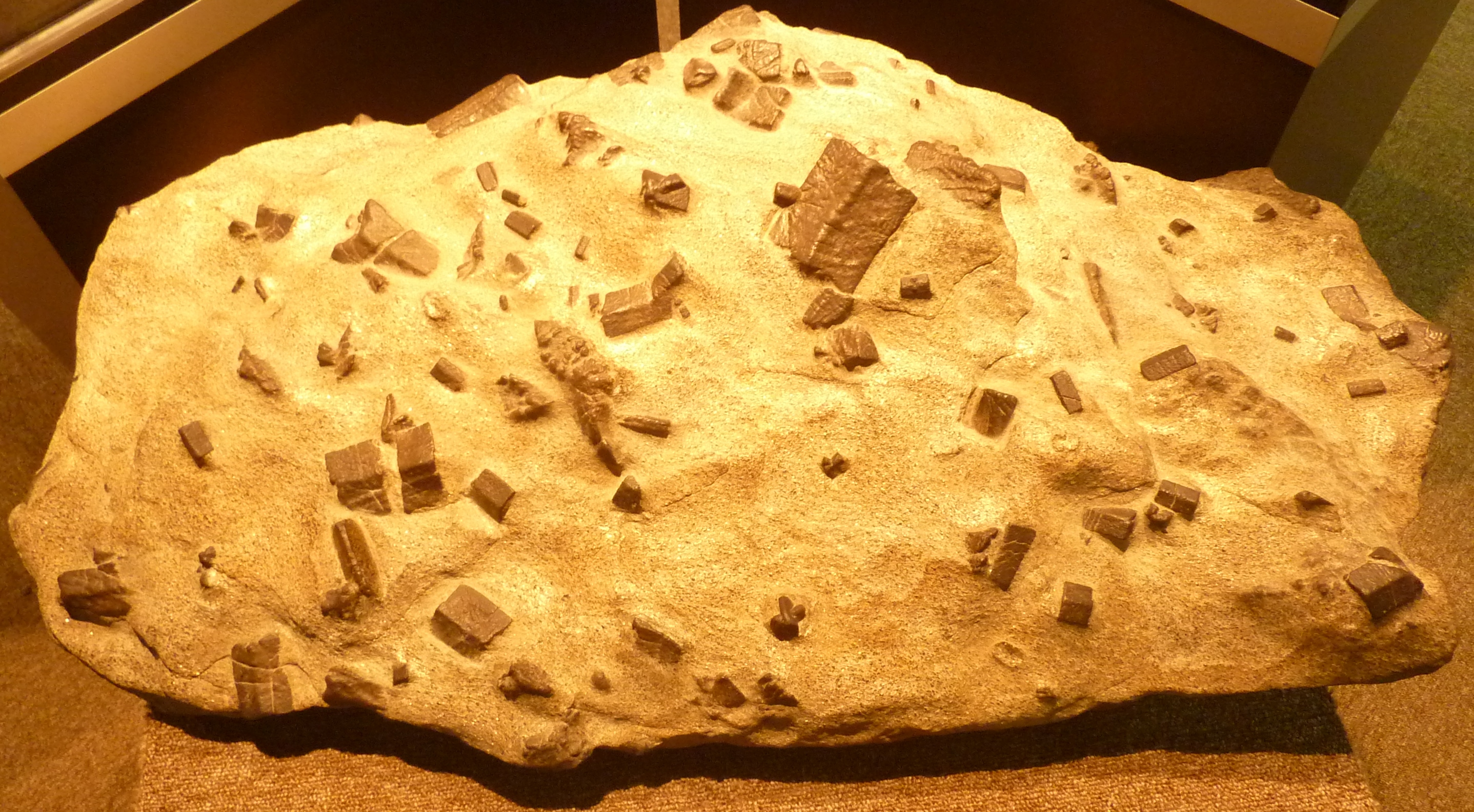 Micaschiste à staurotides (staurolites) trouvé à Coray (Finistère) (Maison des minéraux de Crozon)